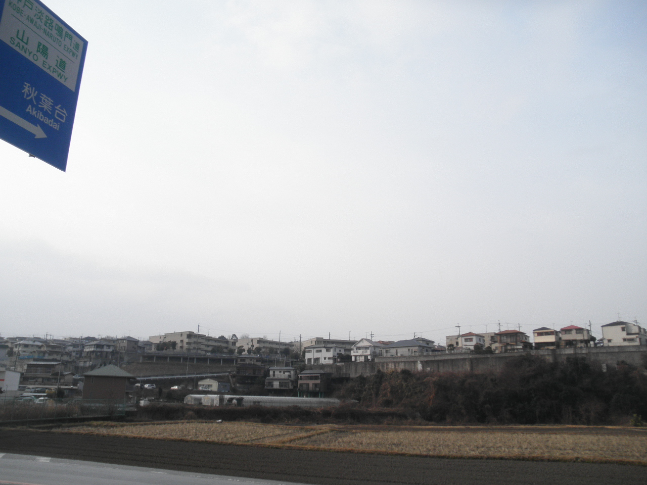 兵庫県神戸市西区押部谷町木幡